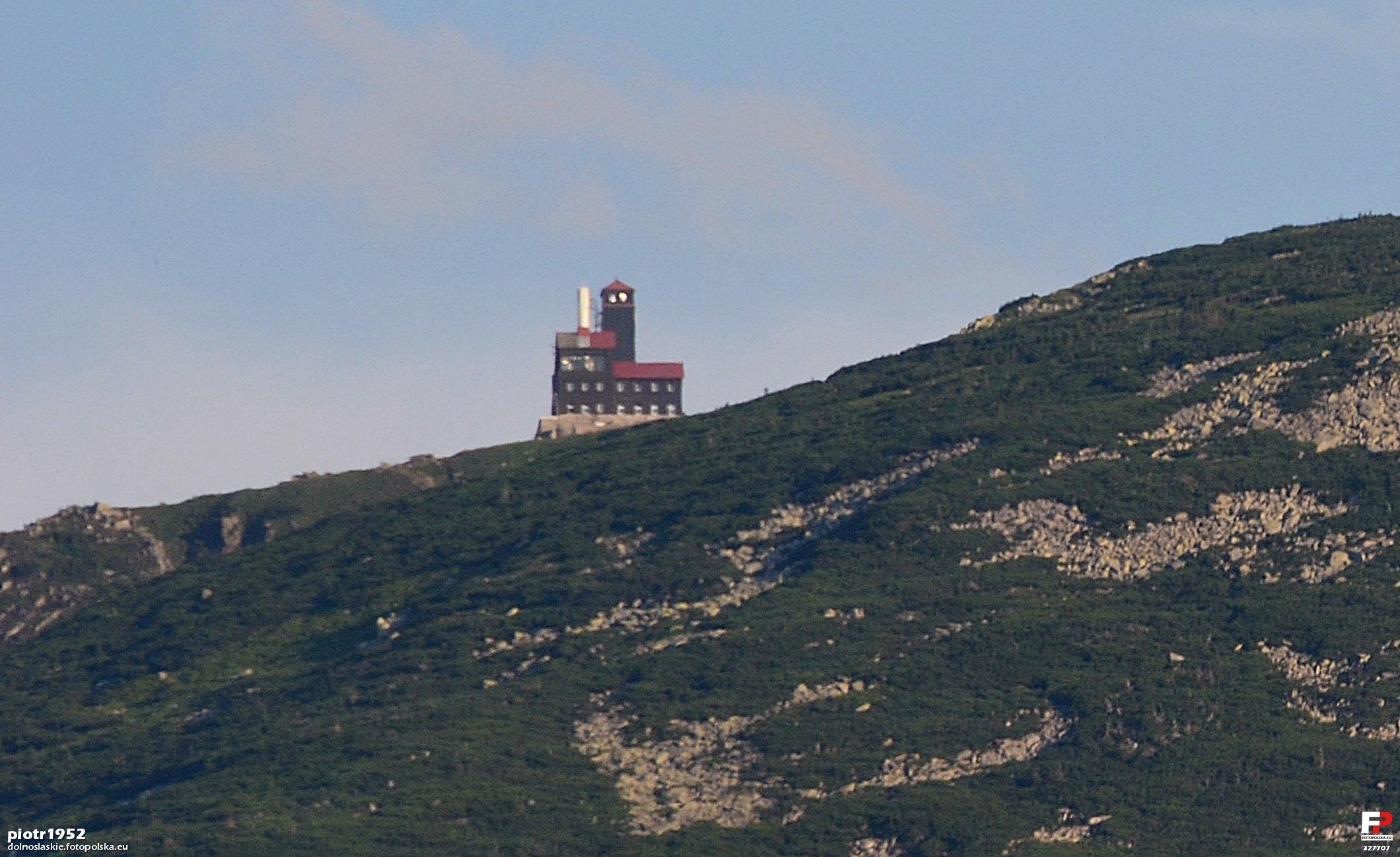 Śnieżne Kotły to polodowcowe kotły znajdujące się w Karkonoszach w okolicach Szklarskiej Poręby. Nad urwiskiem kotłów stoi budynek stacji przekaźnikowej, który widoczny jest z wielu kilometrów. Jest to bardzo charakterystyczny punkt na panoramie Karkonoszy. Budynek stacji powstał w 1837 roku jako schronisko górskie i nosił nazwę "Schronisko nad Śnieżnymi Kotłami" (niem. Schneegrubenbaude). Pod koniec XIX wieku stało się ono wielkim hotelem z wieżą widokową. Schronisko przestało pełnić swoją funkcję w 1960 roku i od tego czasu pełni rolę stacji nadawczej. Niemniej jednak wokół budynku stacji odpoczywają turyści odwiedzający Śnieżne Kotły. W/w opis jest ściągnięty z internetu